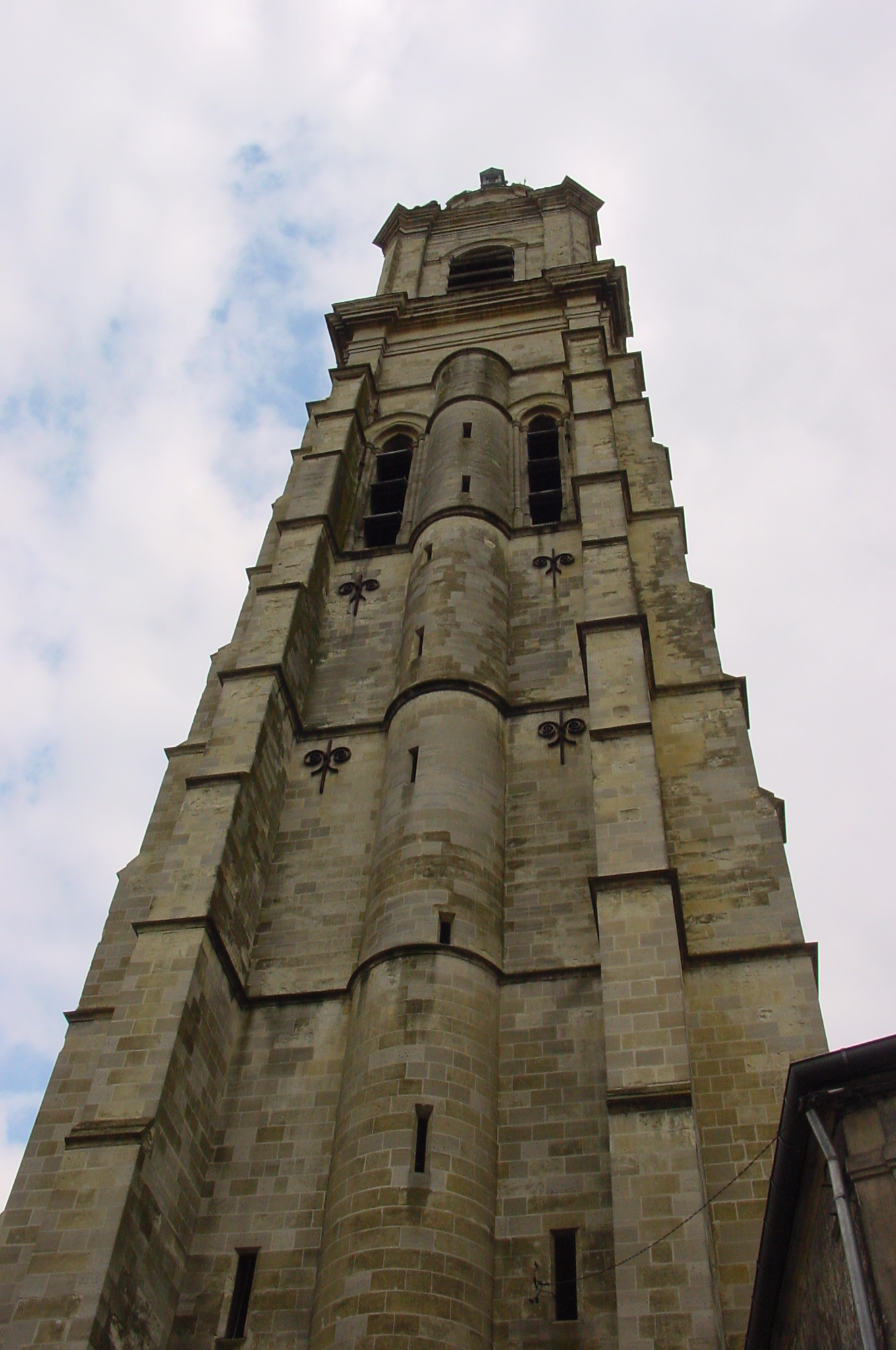 Beffroi, Cambrai (clocher de l'ancienne église St Martin)